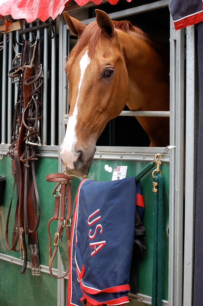 Lanoo, KWPN